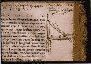 Trquetrum, Zeichnung von Wilhelm Schickard